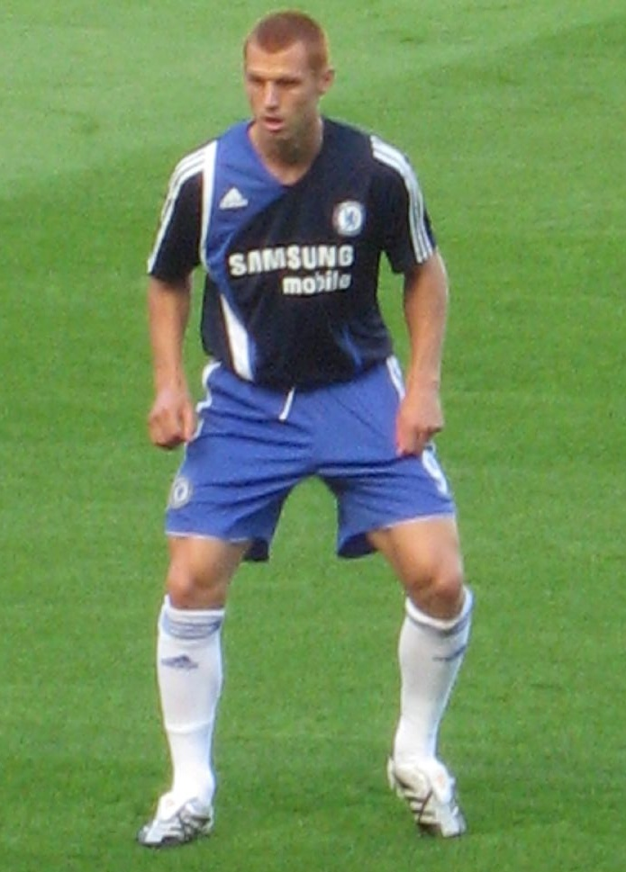 Steve Sidwell